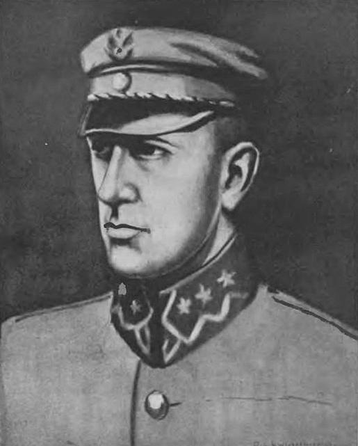 Przemysław Barthel de Weydenthal (rys. ppor. Kazimierz Włodarkiewicz)